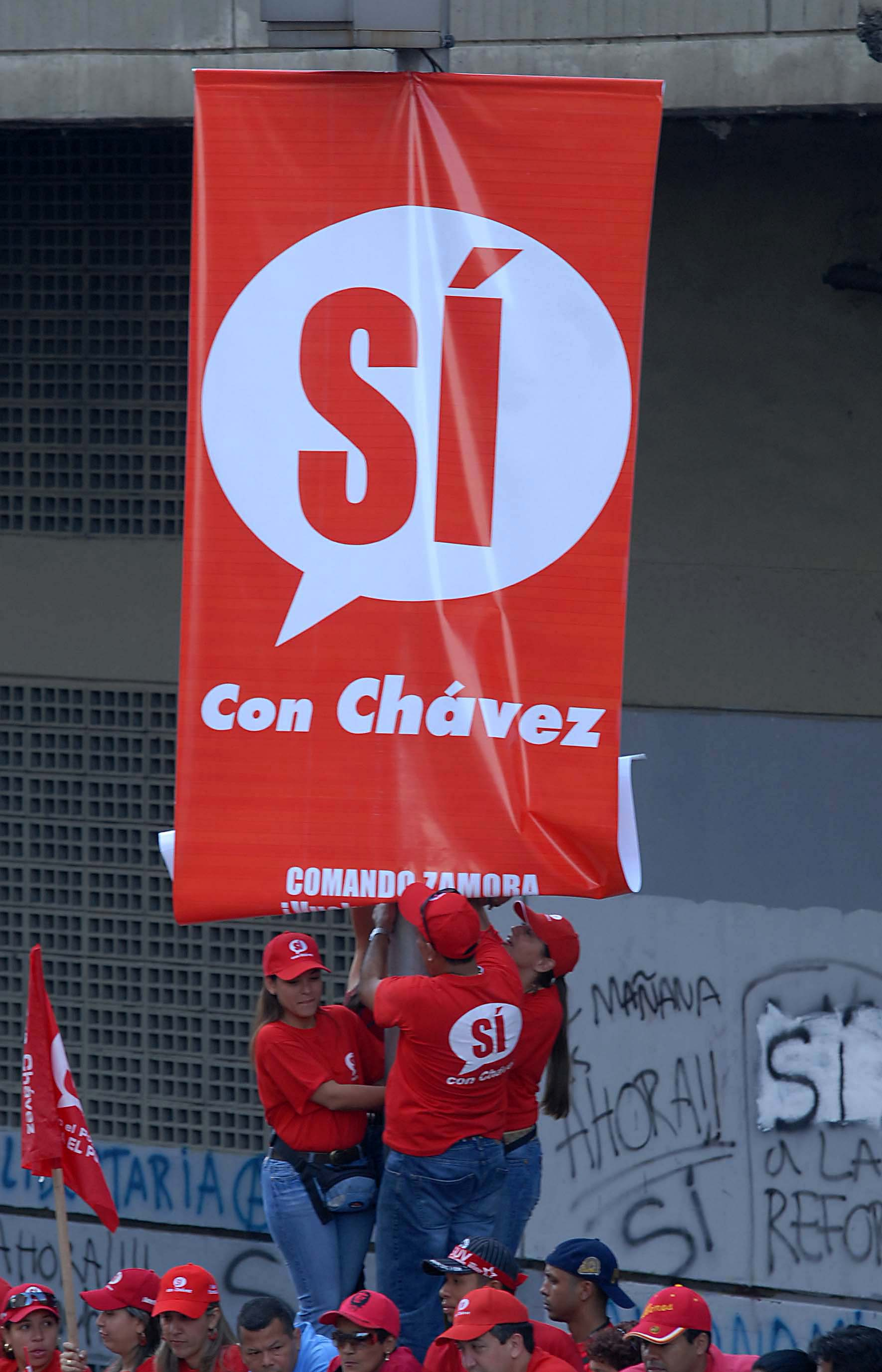 Manifestantes fijan un cartel a favor de la reforma venezolana propuesta por el Presidente Hugo Chávez.